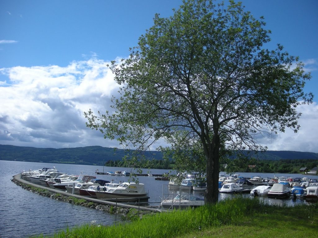 Røykenvik ved Randsfjroden nær Brandbu